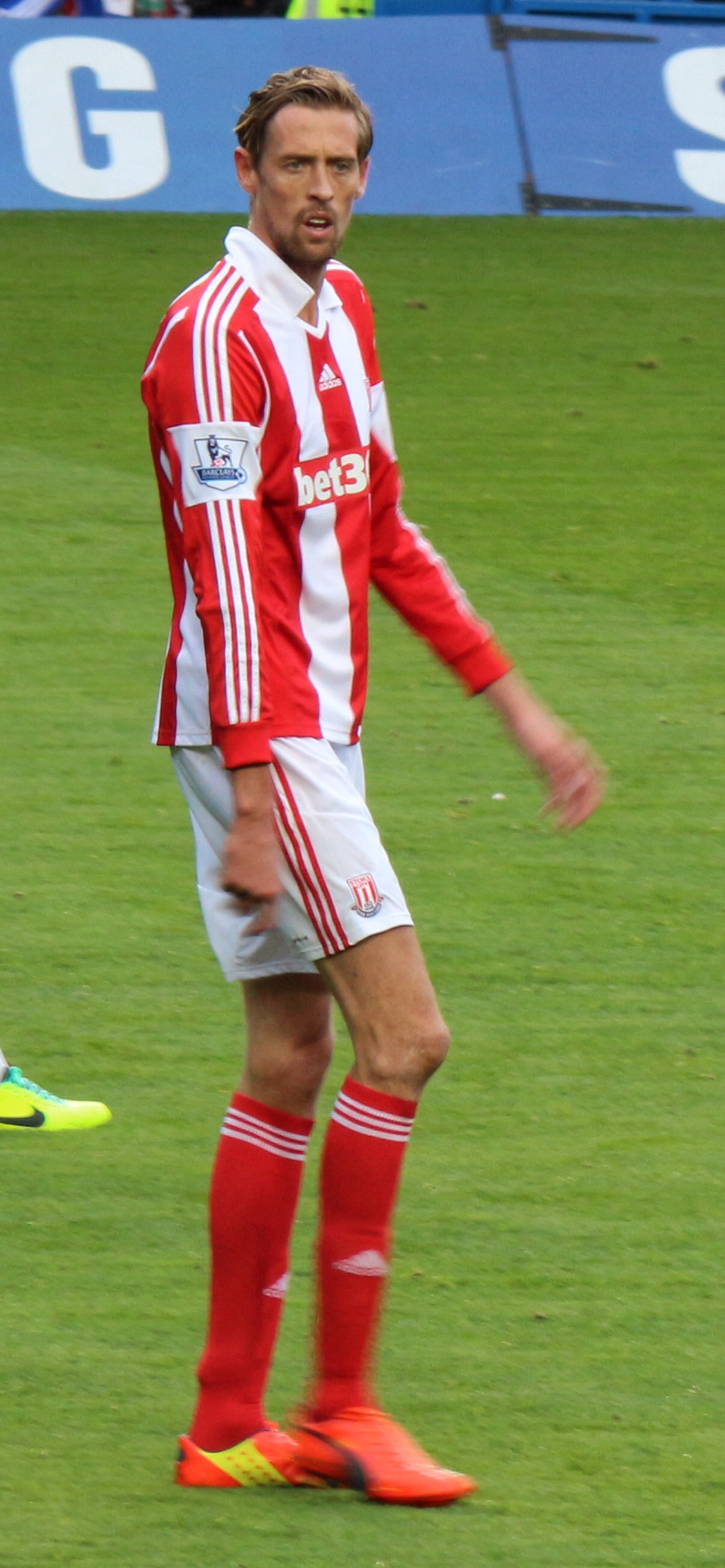 Chelsea 3 Stoke 0